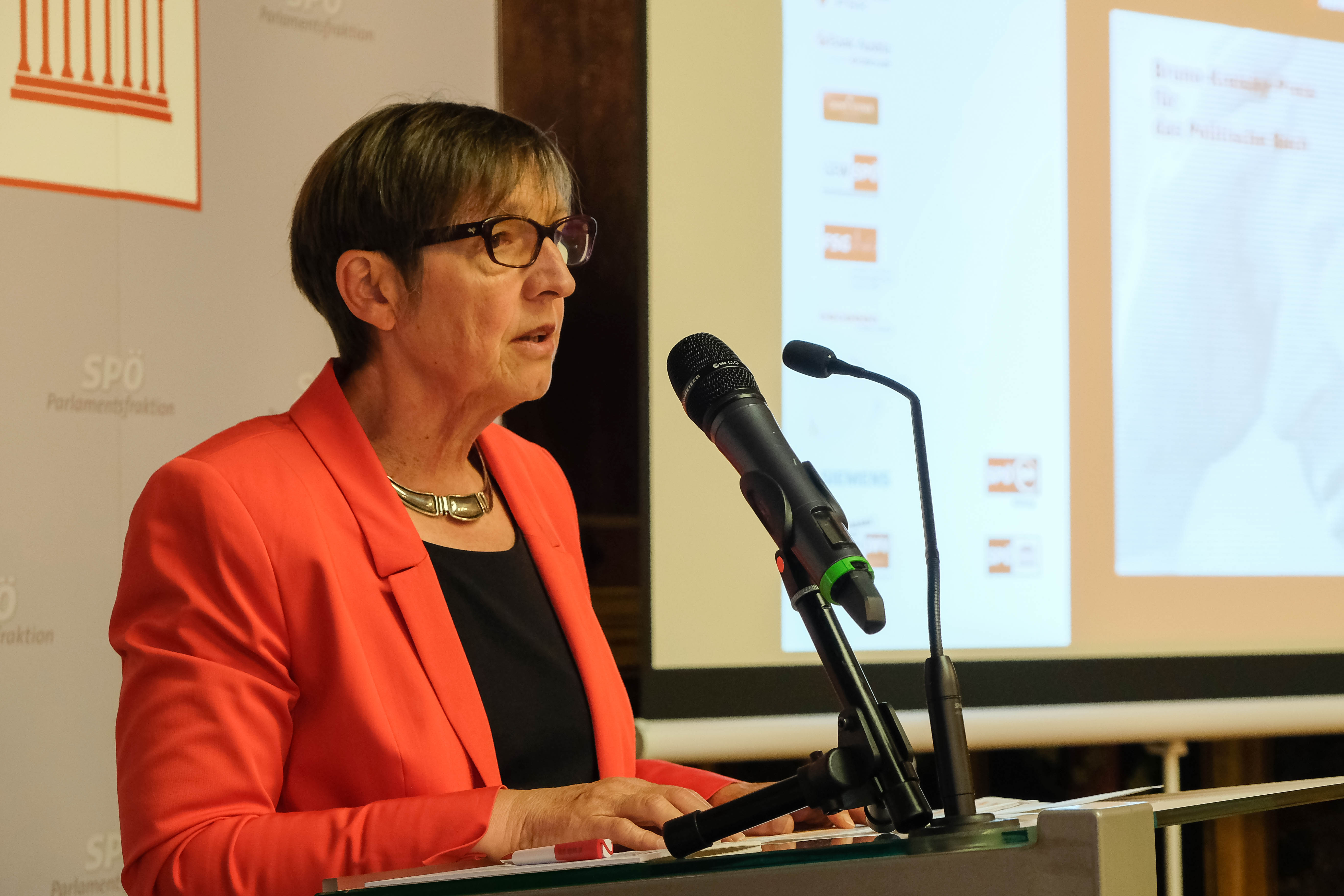 Foto: Walter Henisch